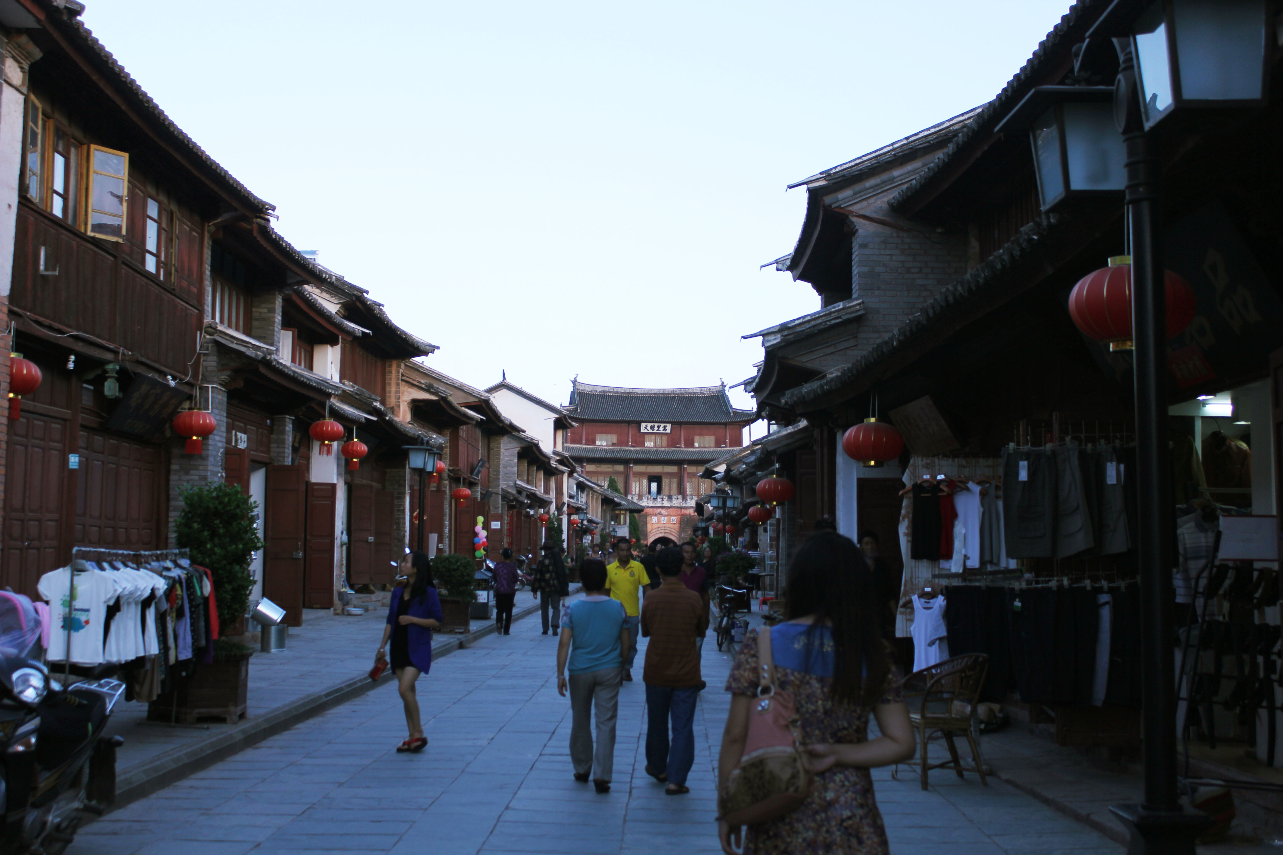 中国云南巍山古城内的日昇路，远处为拱辰门。